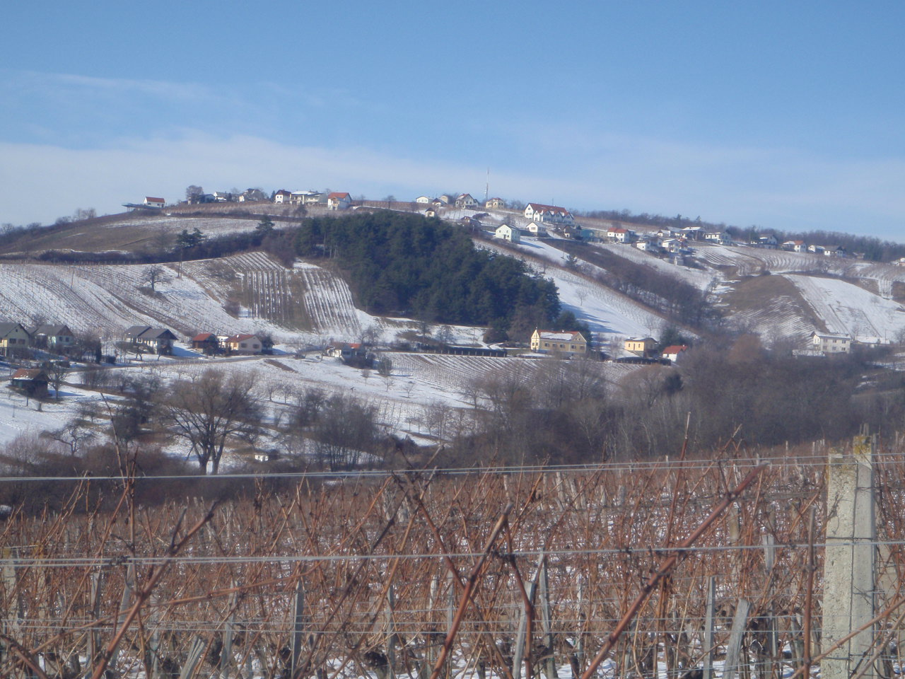 Eisenberg von Grossdorfer Weinberg, Richtung Eisenberg-Deutsch Schützen